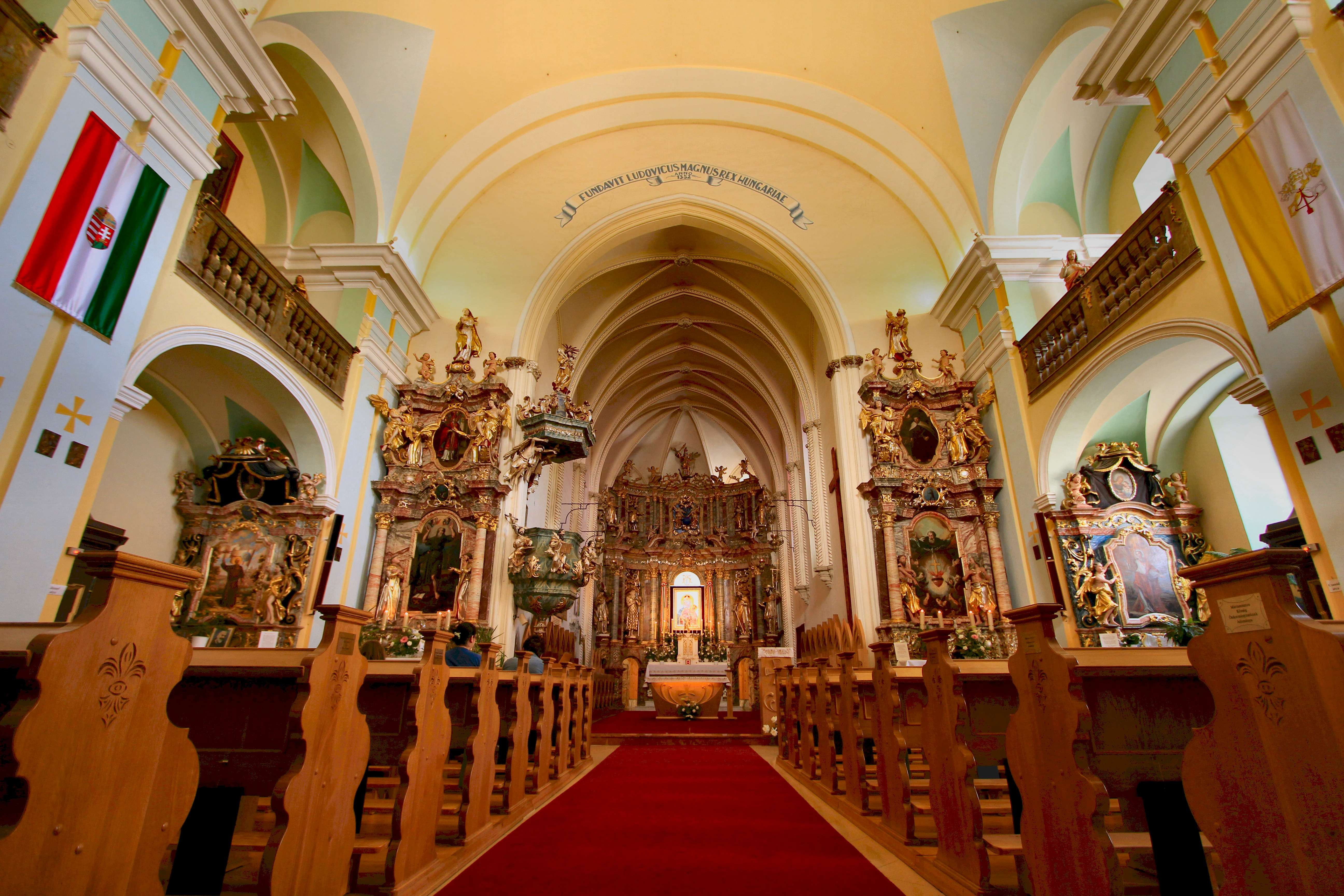 Márianosztrai kegytemplom